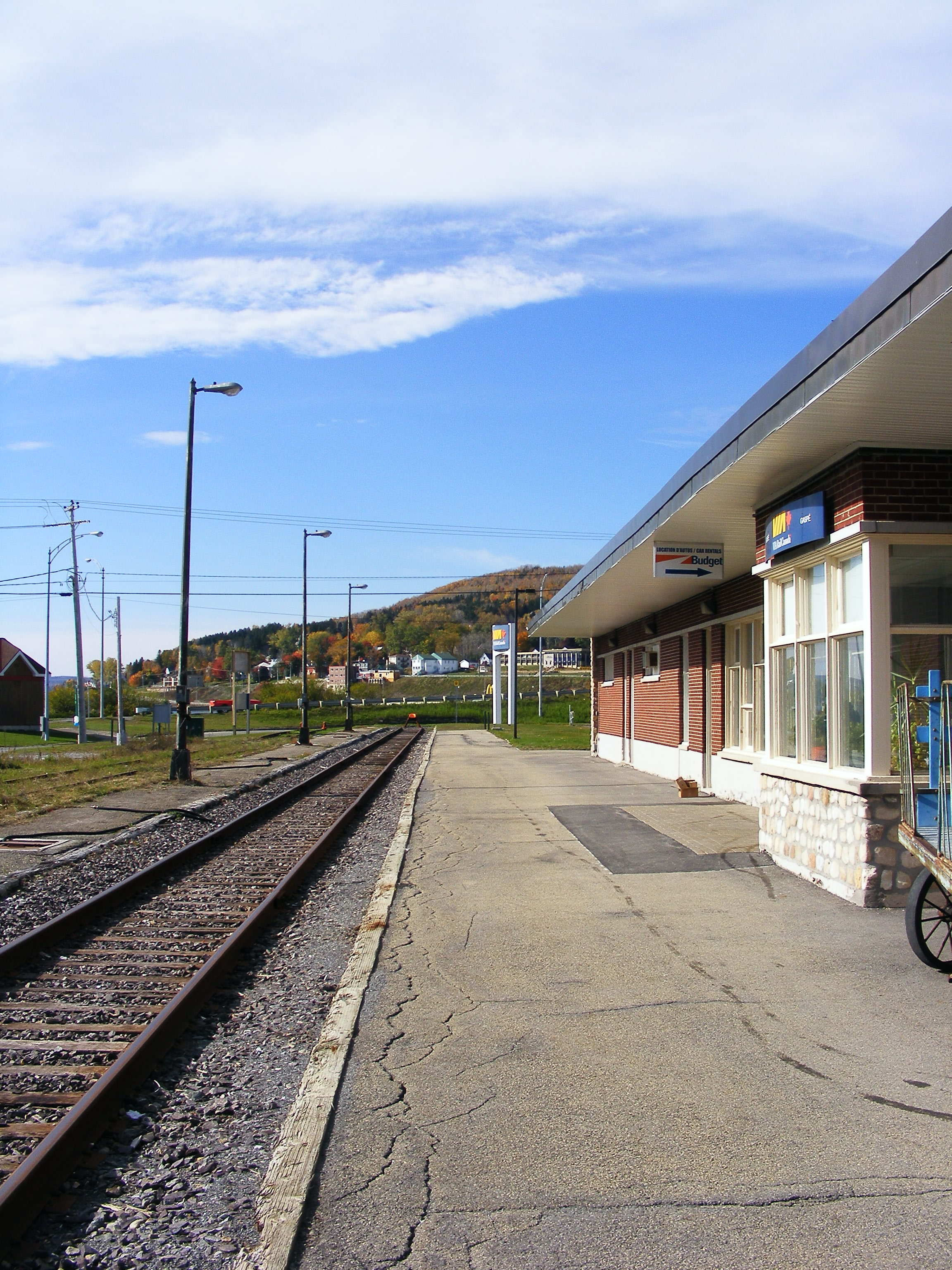 Via Rail